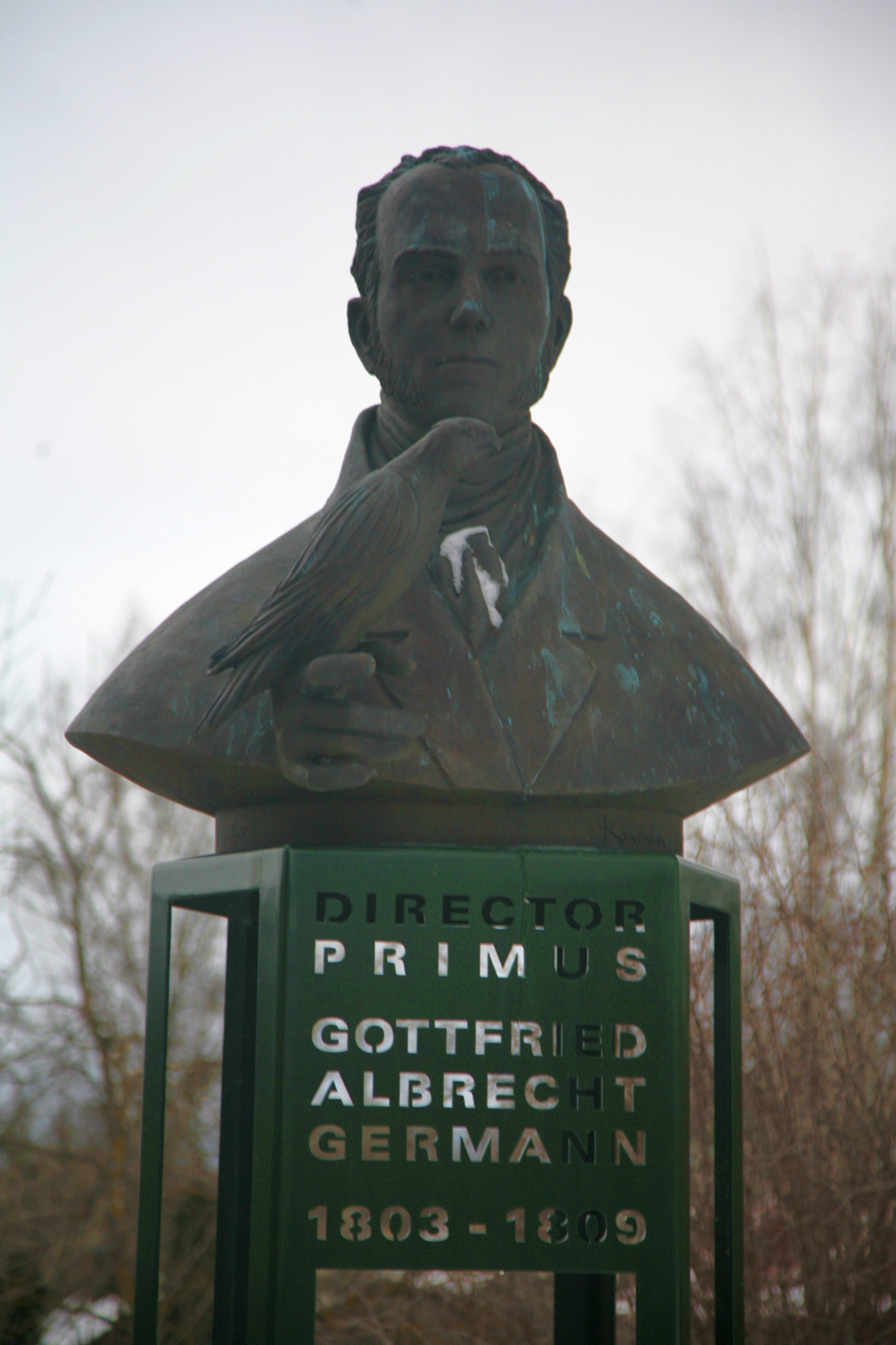 Botaanikaaia esimese direktori Germanni kuju Tartu botaanikaaias (lähivaade), 3. veebruar 2013.